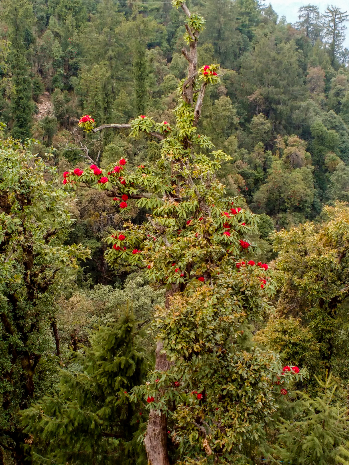 IMG_20160325_173233268